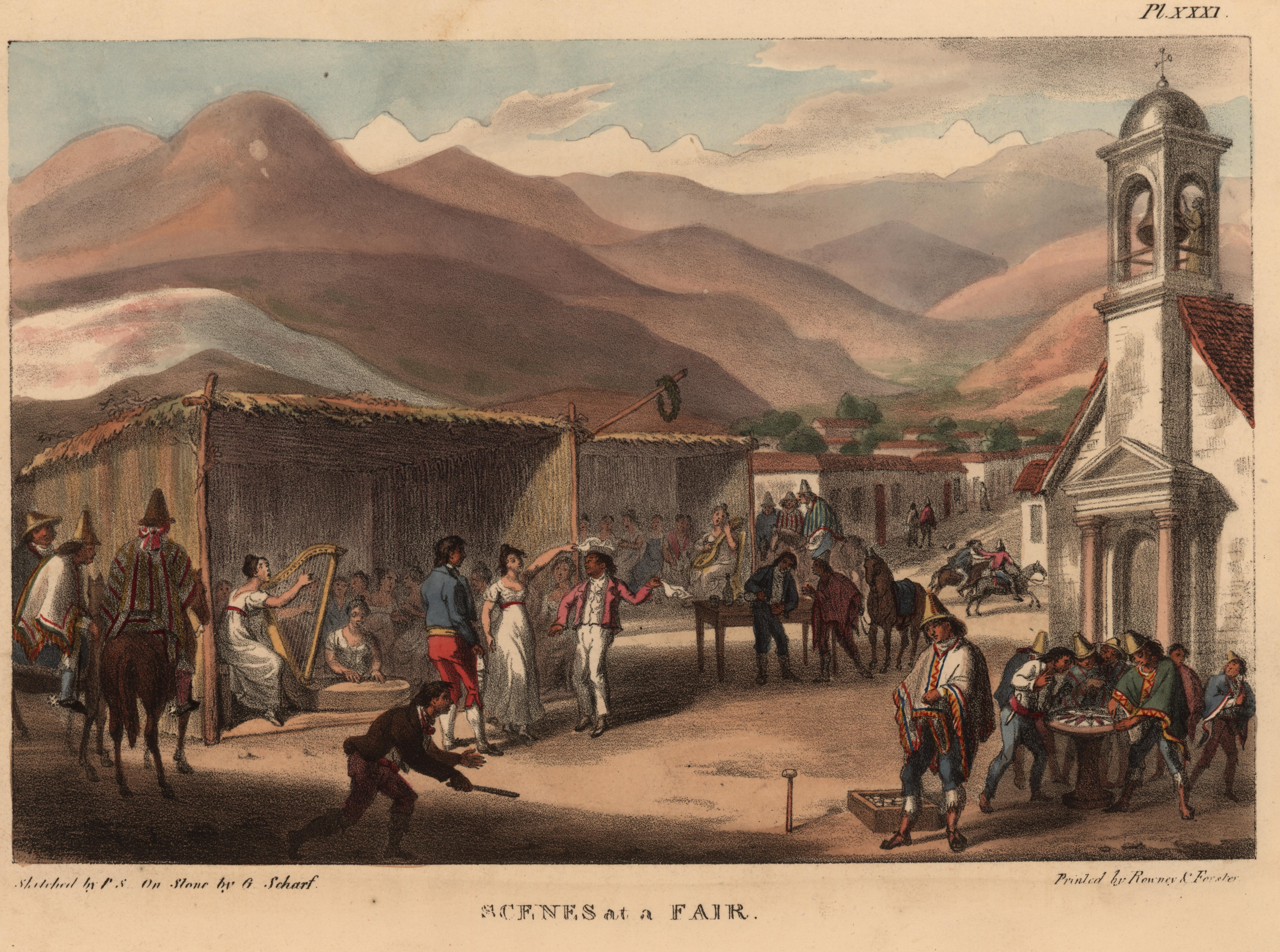 Escenas en una feria en Chile; dibujo del viajero y filántropo inglés Peter Schmidtmeyer; litografía coloreada de George Johann Scharf; impresa por Rowney & Forster y publicada en el libro del Travels into Chile, over the Andes, in the years 1820 and 1821, London: Longman, Hurst, Rees, Orme, Brown and Green, 1824.